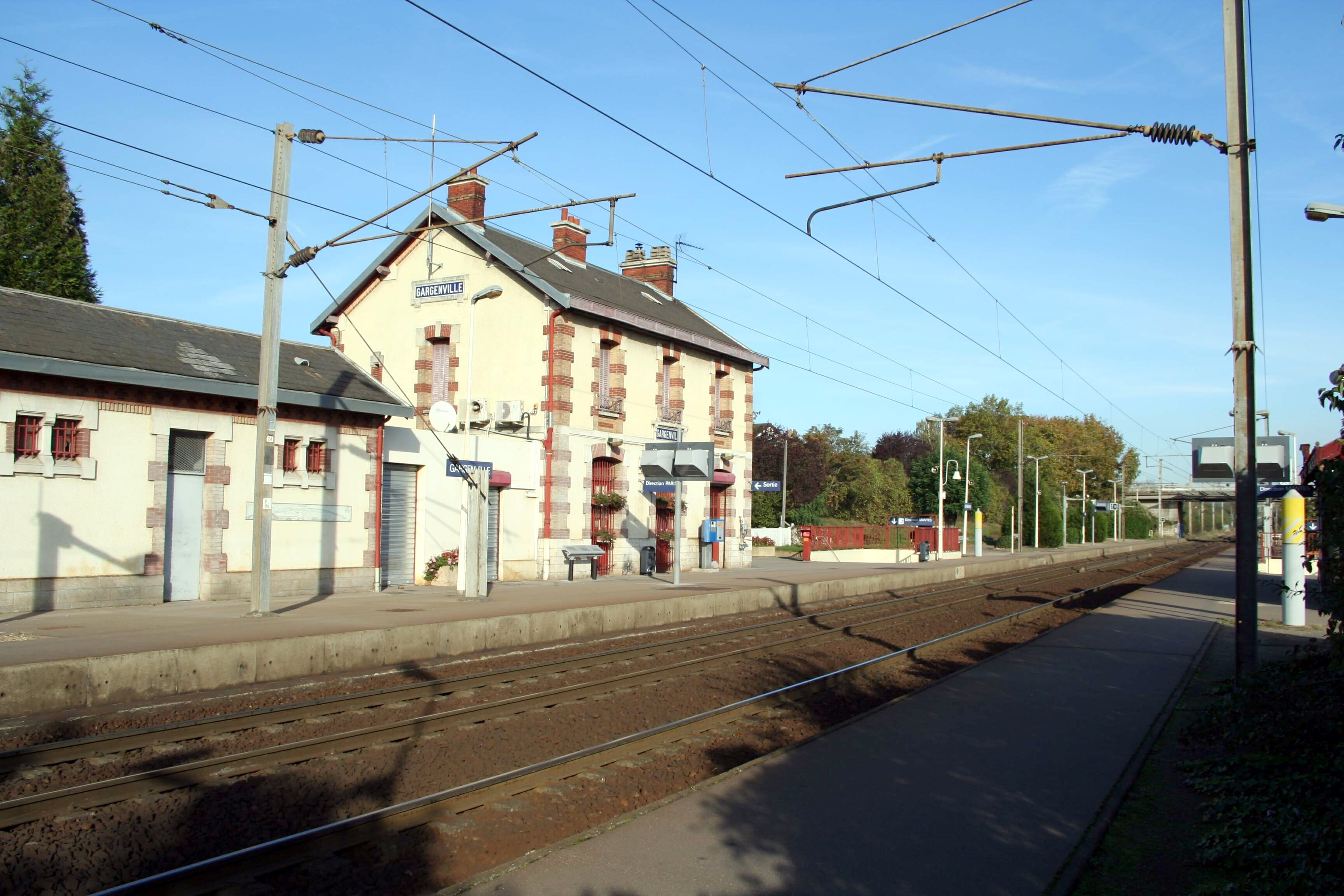 Gare de Gargenville - Yvelines (France) le bâtiment voyageurs vu des quais